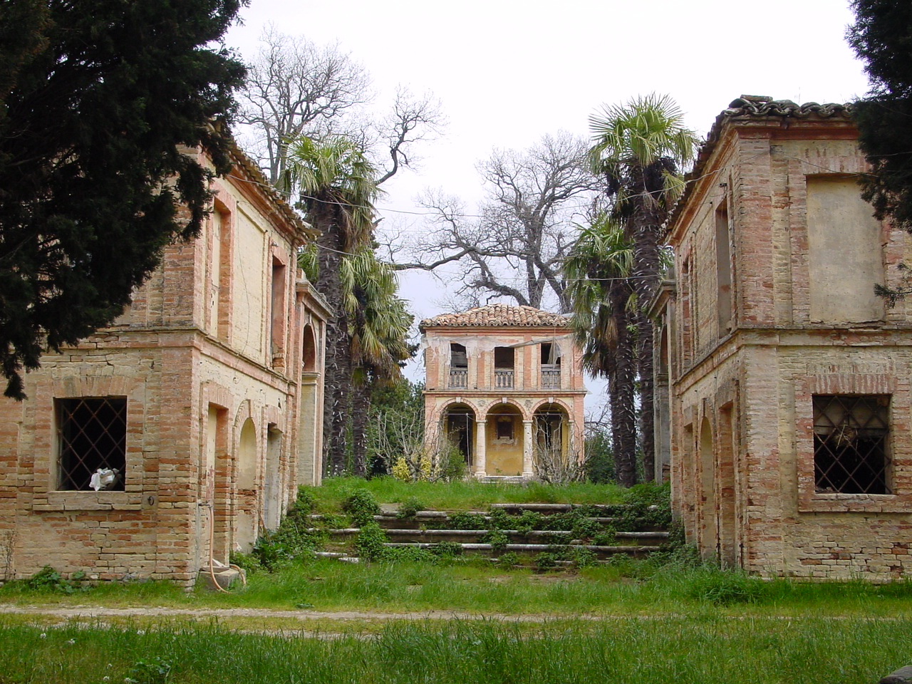 Prospetto del Casino di Caccia di Villa Valcerasa, detto il Roccolo